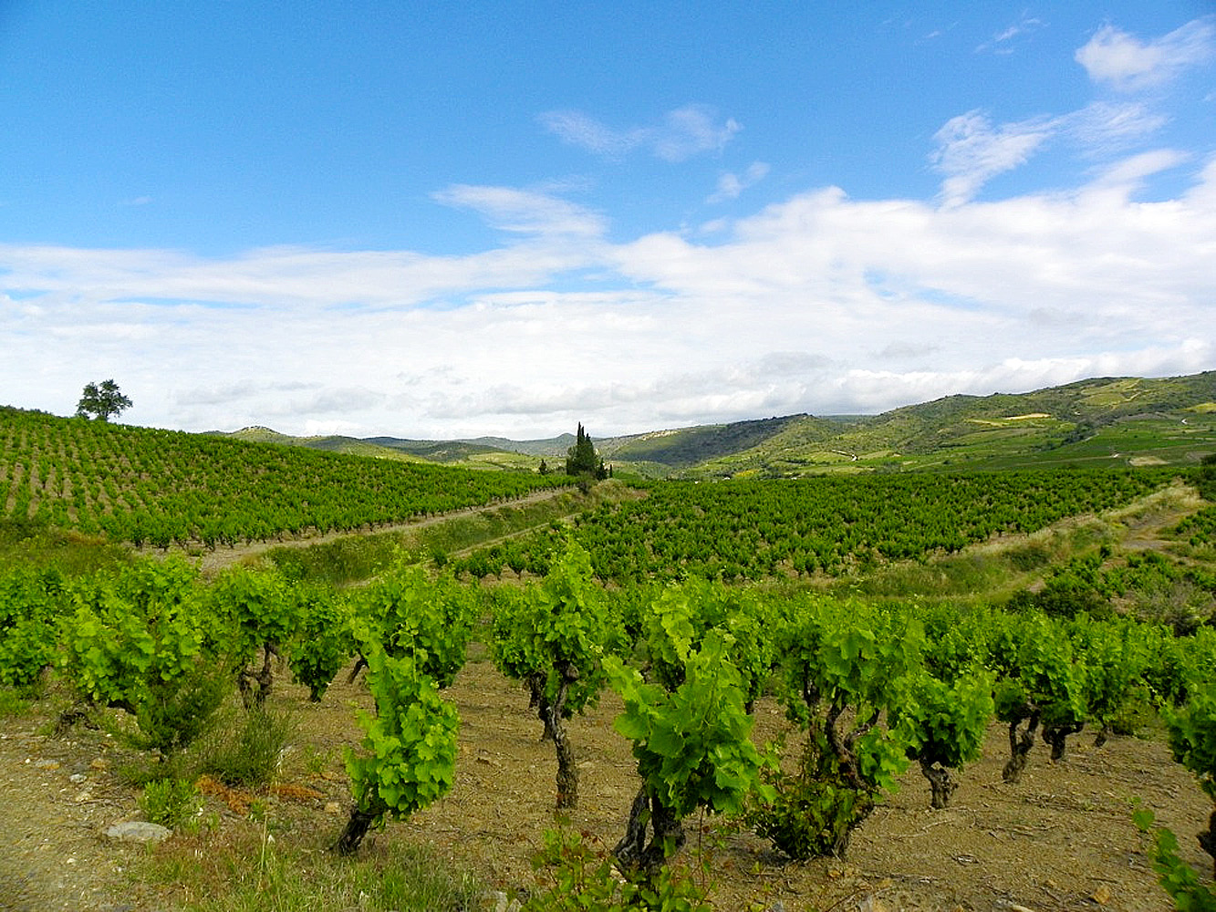 Vignes à Villeneuve-les-Corbières